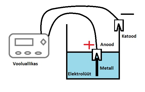 Anodeerimine